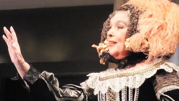 7\1\12,ДК Выборгский,гастроли театра Сатиры в Санкт-Петербурге